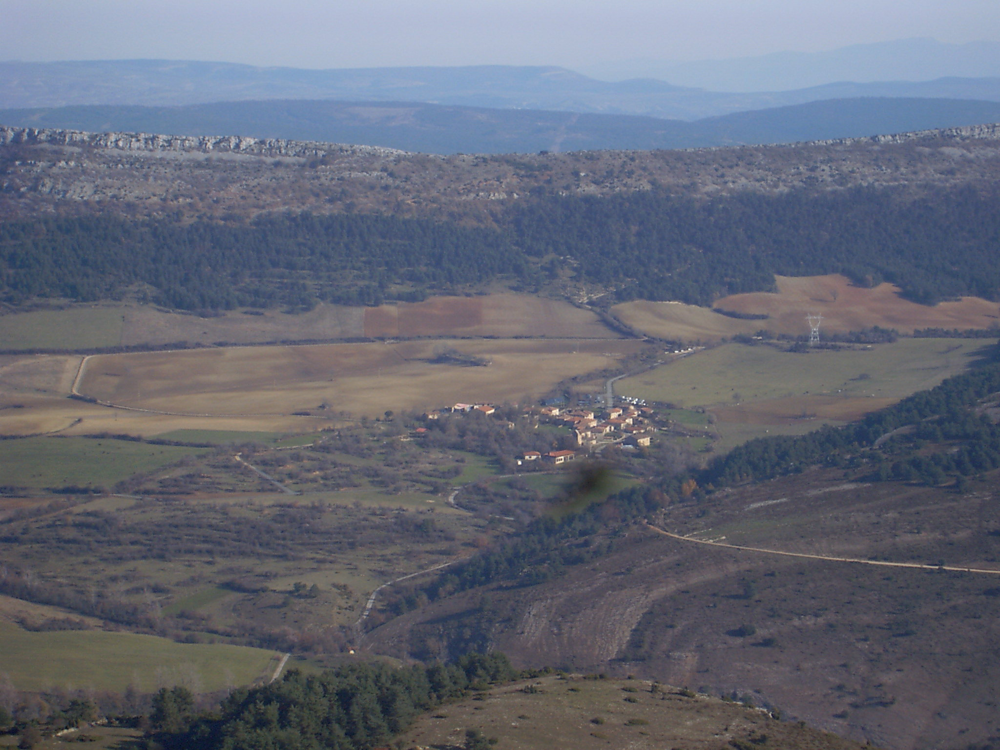 Lalastra herria